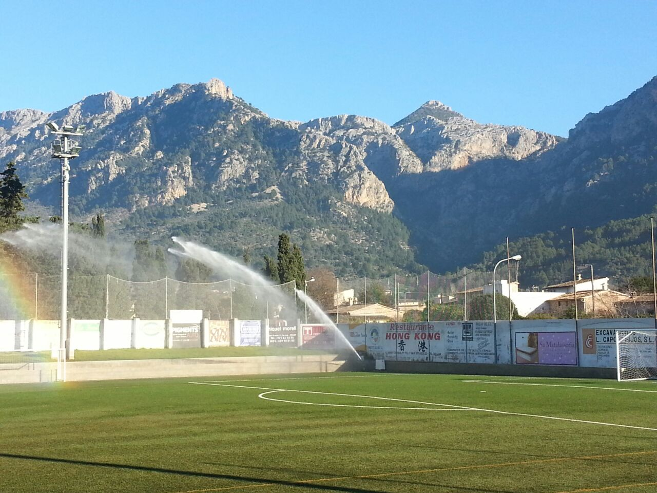 Campo de fútbol de Sóller, Mallorca. (Spain)